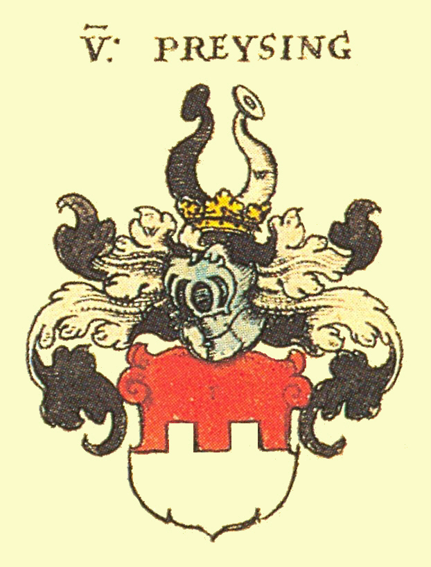 Wappen des Bayerischen Adelsgeschlechts Preysing